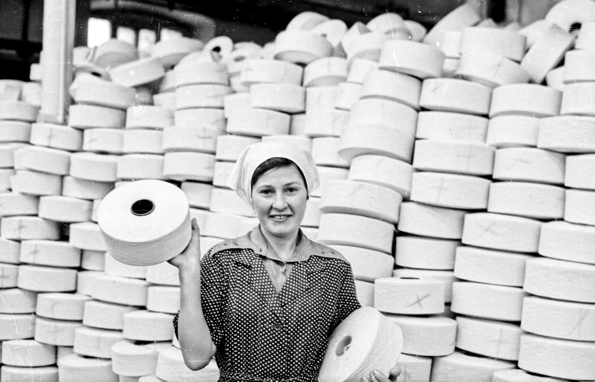 Тростильщица фабрики «Красное эхо» Людмила Григорьевна Чертакова (она же Балашова, групорг смены, народный контролёр) держит бобину с трощёной пряжей. Пряжа тростилась из трёх или шести веретён на одну катушку. Нитки держатся на катушке за счёт плотности намотки и сцепления волокон между собой. Катушки с трощёной пряжей поступают из тростильного цеха в крутильный цех, где отдельные нитки скручиваются в готовую пряжу. Крестом обозначен тип (3 нити или 6 нитей).